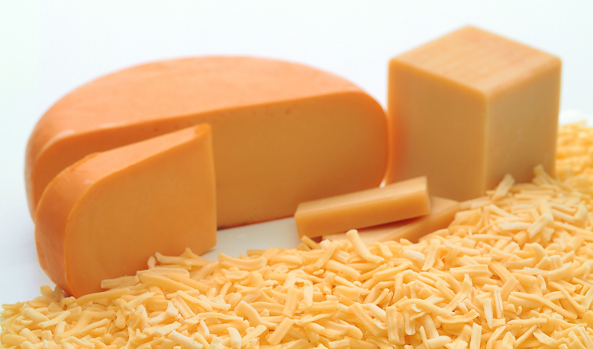 テンフォーで使用されているチーズ